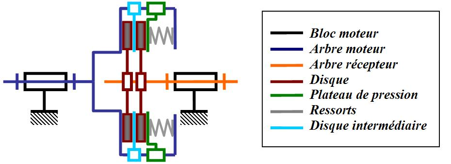 Schéma technologique décrivant le principe de transmission d'un embrayage. La commande de débrayage n'est pas représentée.